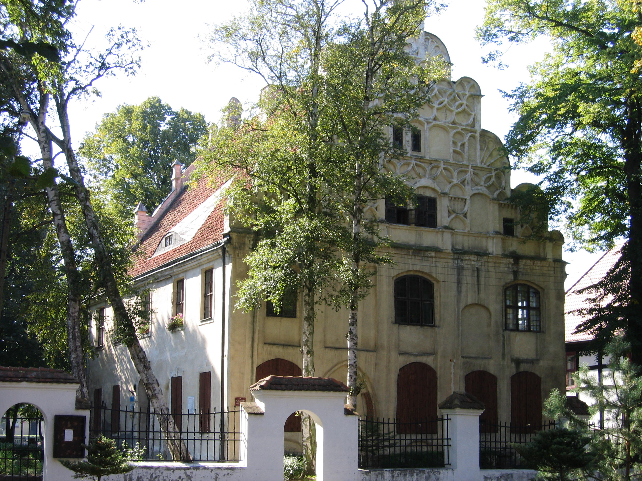 pałac biskupi Kamień Pomorski pl. Katedralny 7